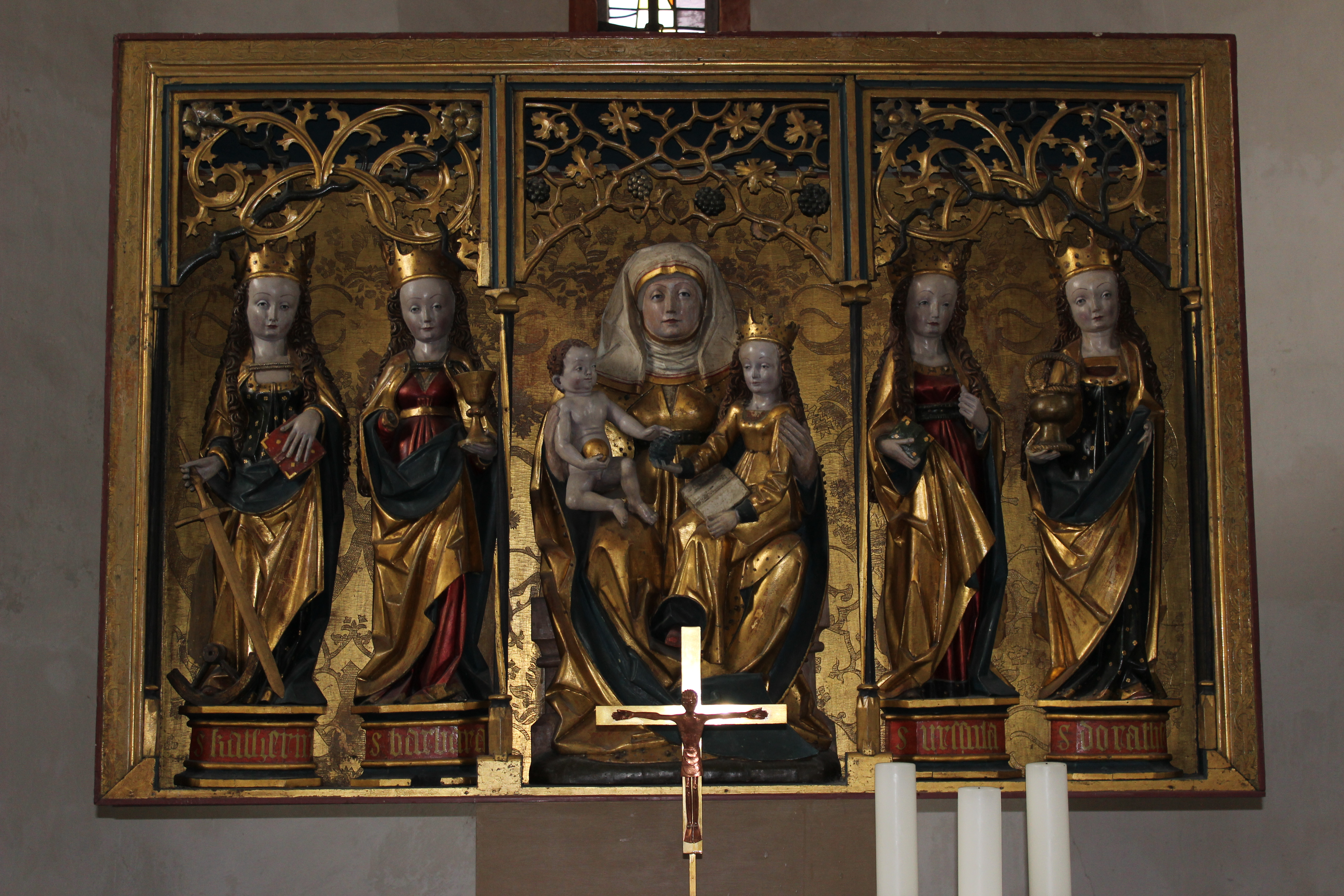 Unserer Lieben Frau Linderbach, Altarbild Anna Selbdritt